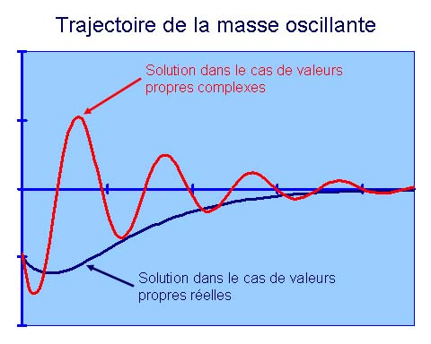 Summary Solutions d'une équation différentielle linéaire d'ordre 2 avec le cas de racines réelles et de racines imaginaires. On obtient un retour à l'équilibre avec ou sans oscillations. Jean-Luc W 8 avril 2006 à 20:11 (CEST) Images Template:Portail mathématiques